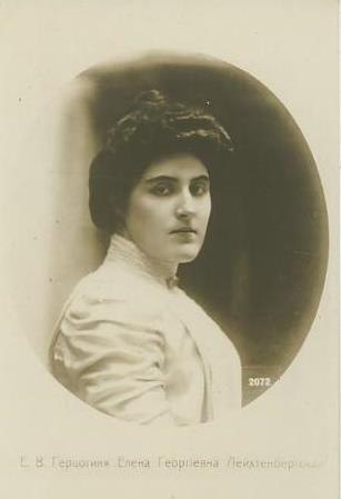 Елена Георгиевна Лейхтенбергская (1892—1971)